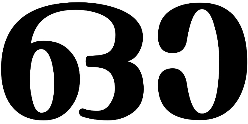 ഓ അക്ഷരം